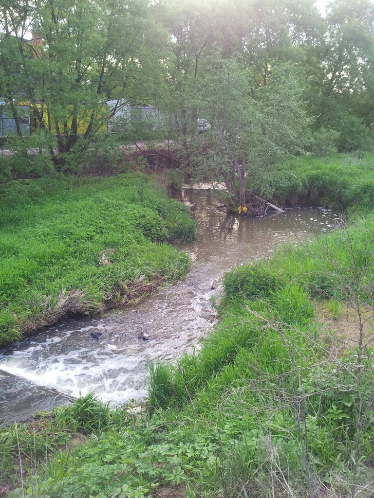 Чаченка в Ромашково